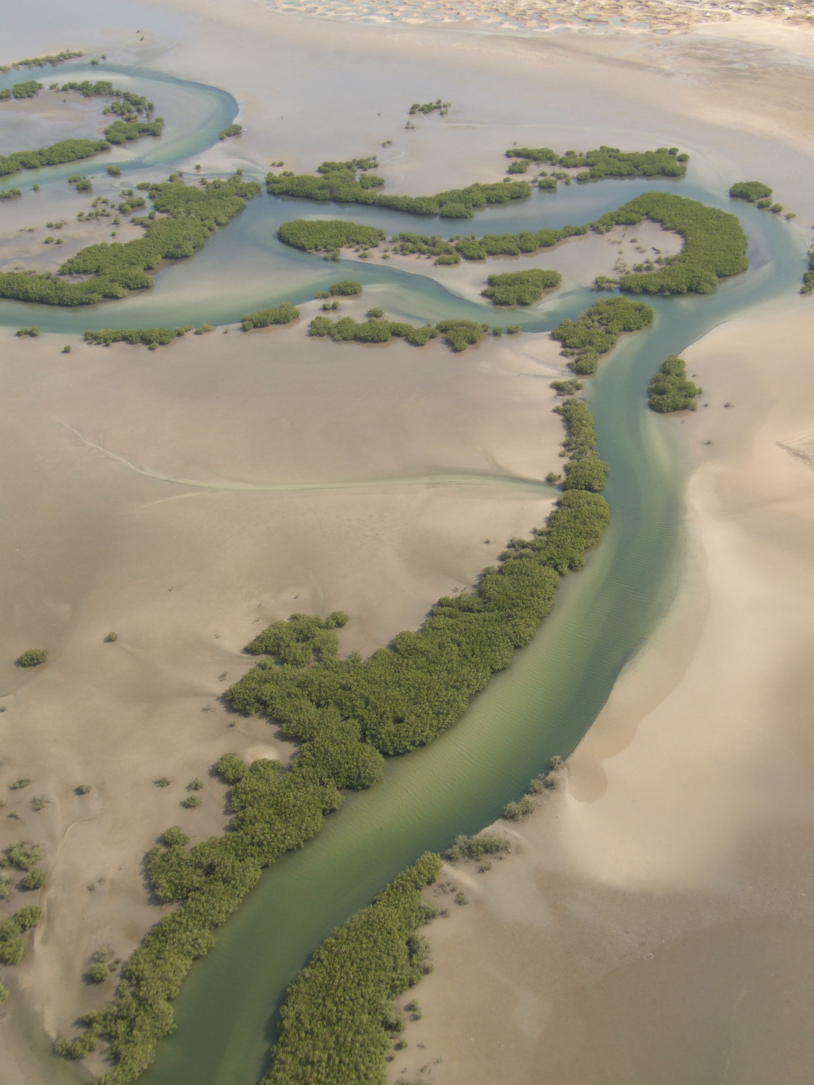 Le fleuve Saloum (Sénégal) vu d'ULM